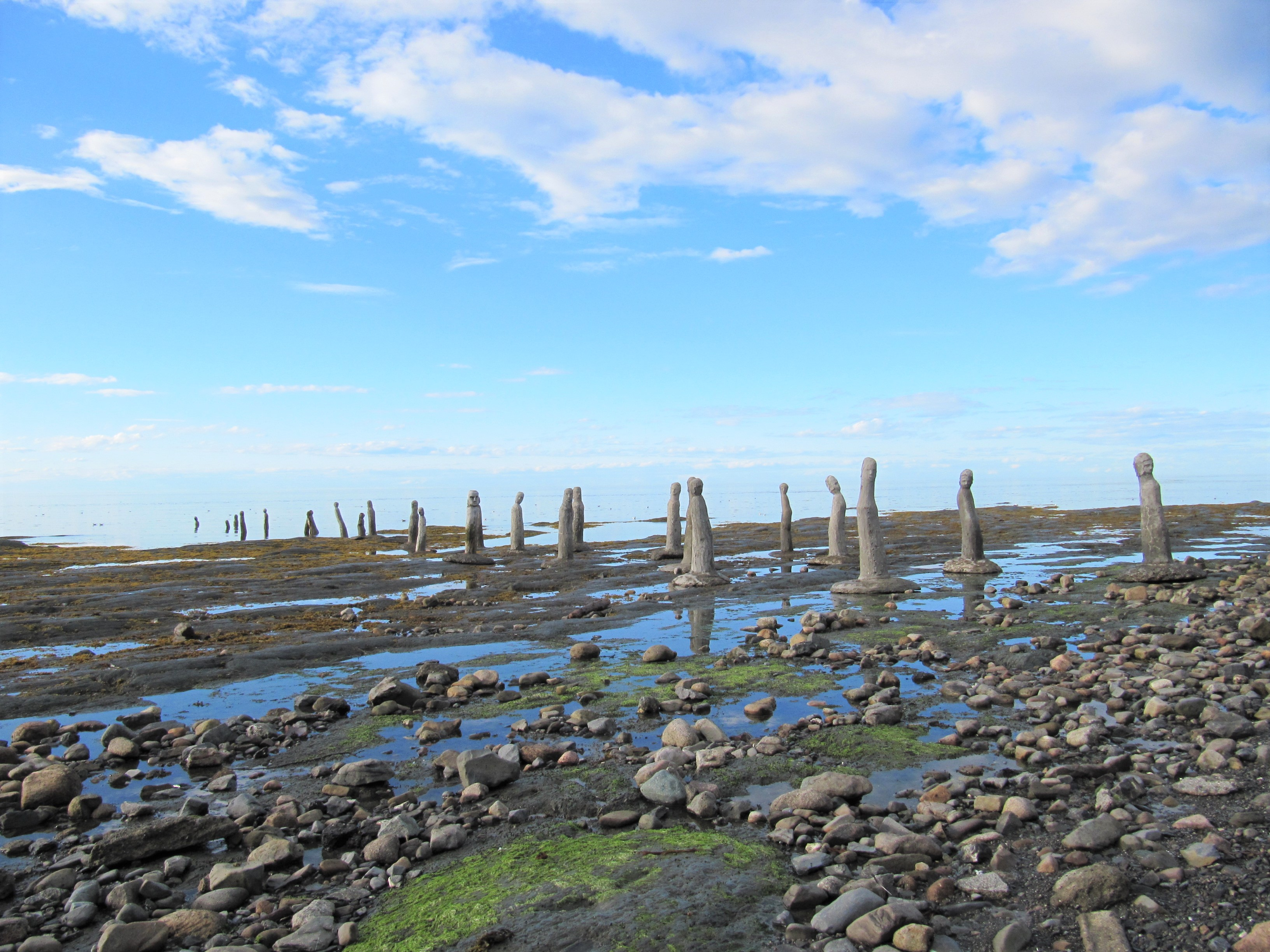 Paysage de Sainte Flavie sur le bord du fleuve St-Laurent prise en 2010